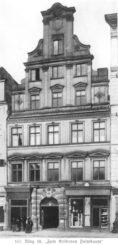 Kamienica Rynek 58 Widok z lat ok 1900